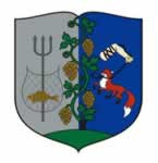 Coat of arms of Gyöngyöshalász, Hungary